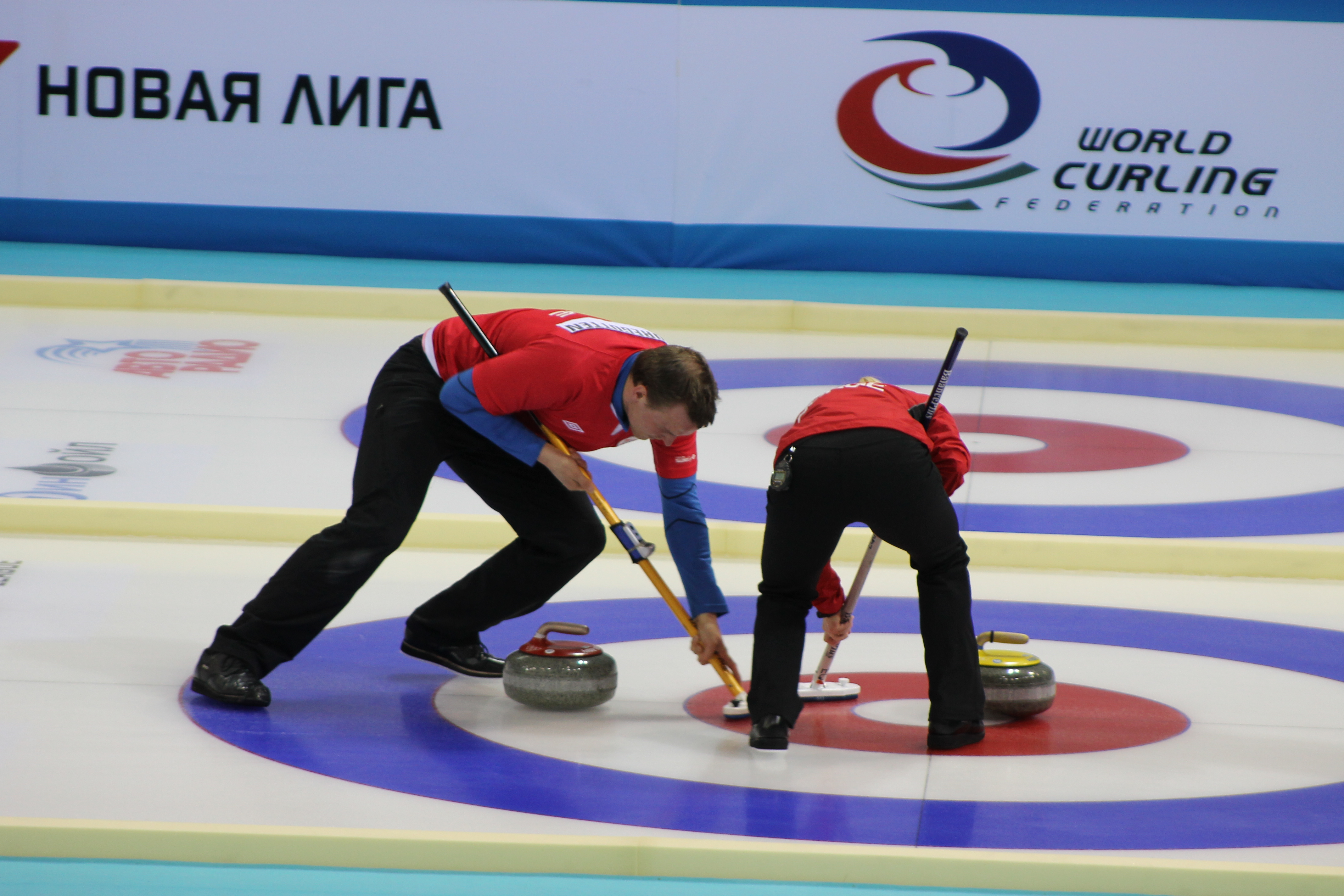 Сборная Норвегии, бронзовый призёр Чемпионата мира по кёрлингу 2015 года в Сочи. Кристин Скаслиен и Магнус Недреготтен